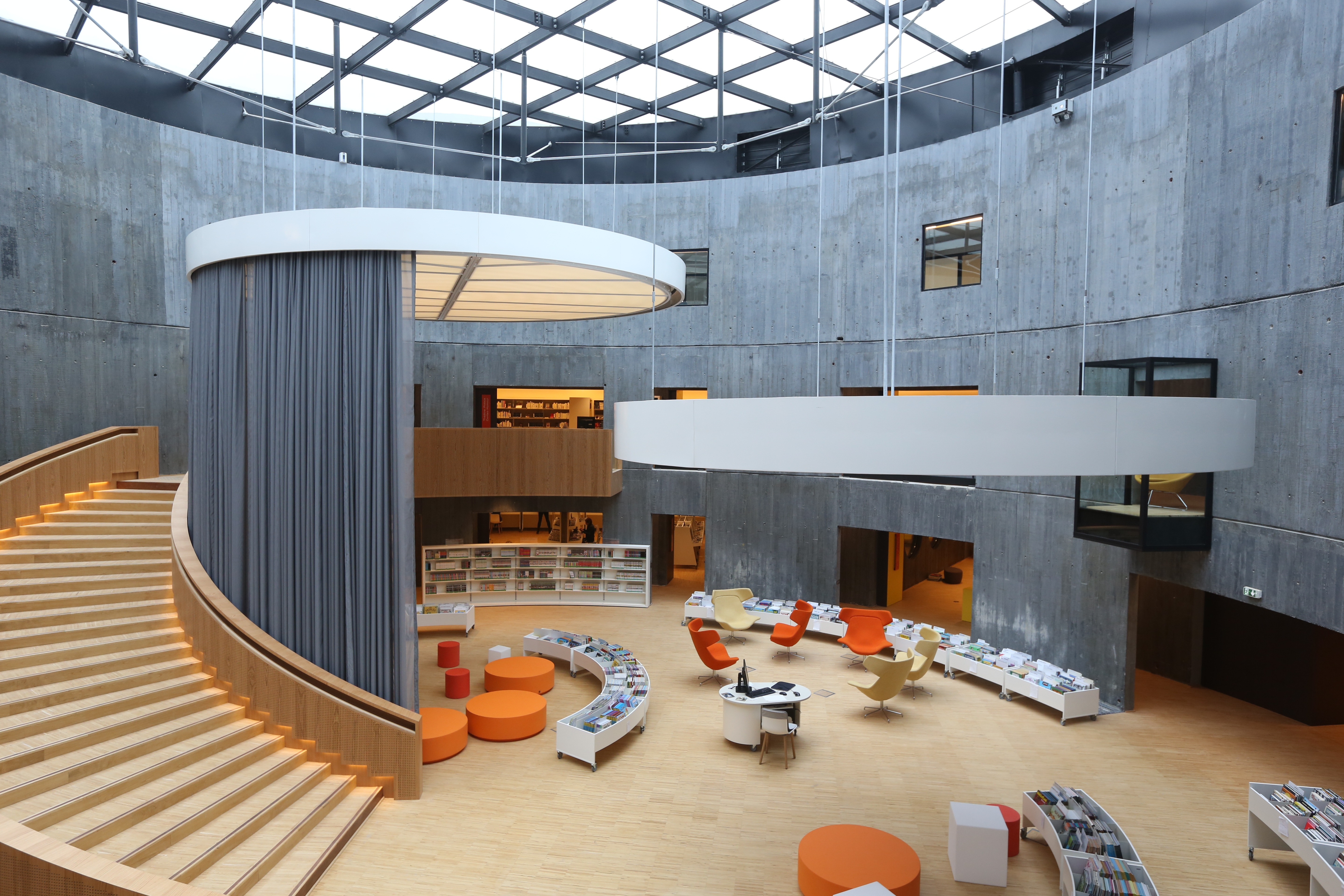 Atrium de la Bibliothèque Oscar Niemeyer du Havre (intérieur du Petit Volcan)